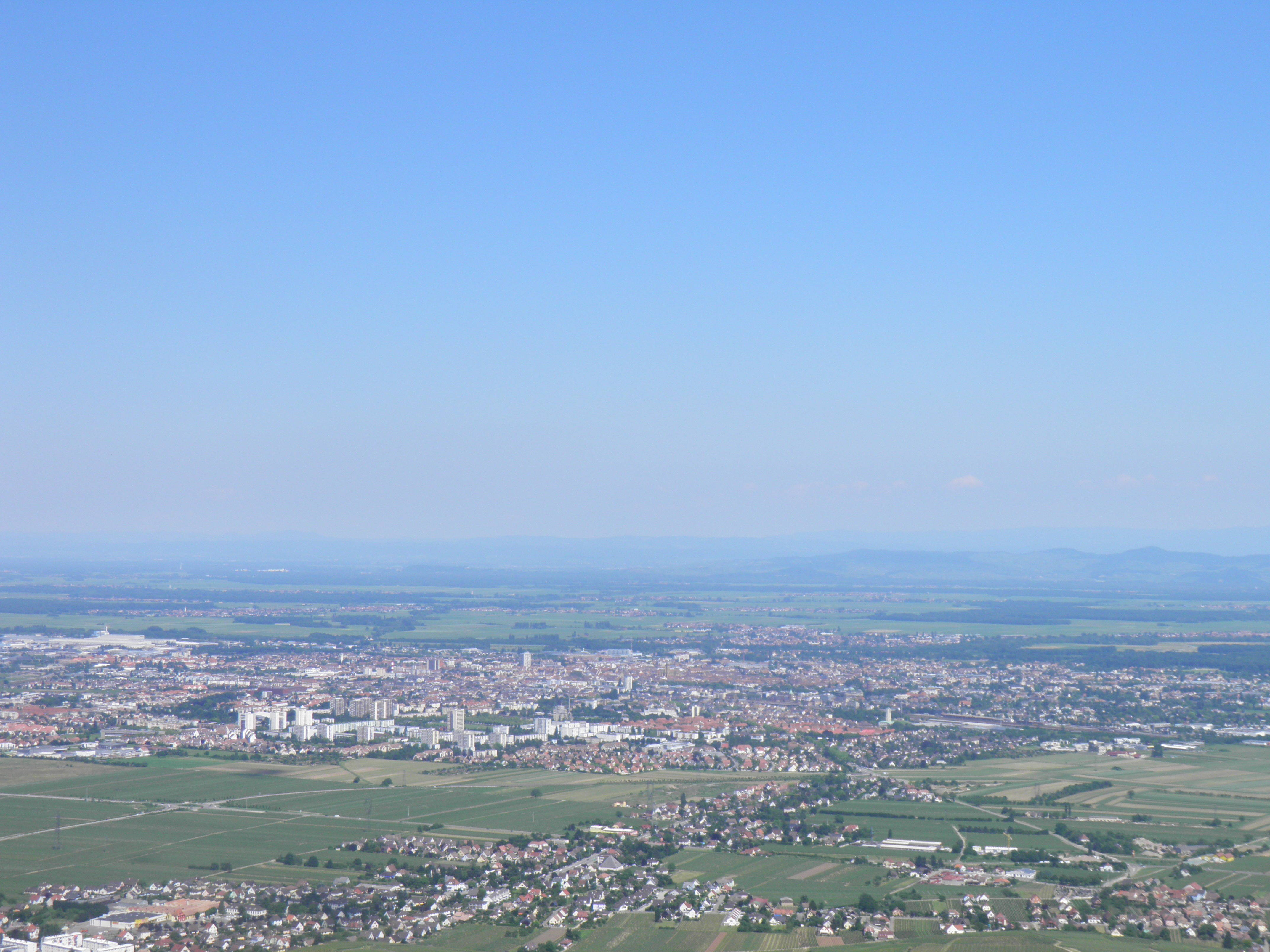 Vue depuis les trois châteaux d'Husseren-les-Châteaux (Haut-Rhin, France).